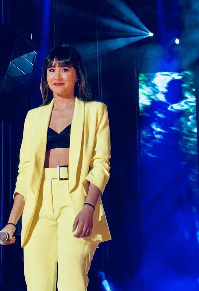 La cantante española Aitana el 1 de junio de 2018 en Málaga